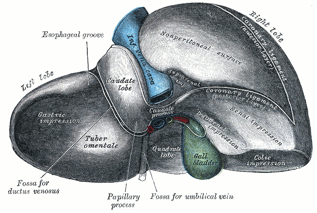 Hepar